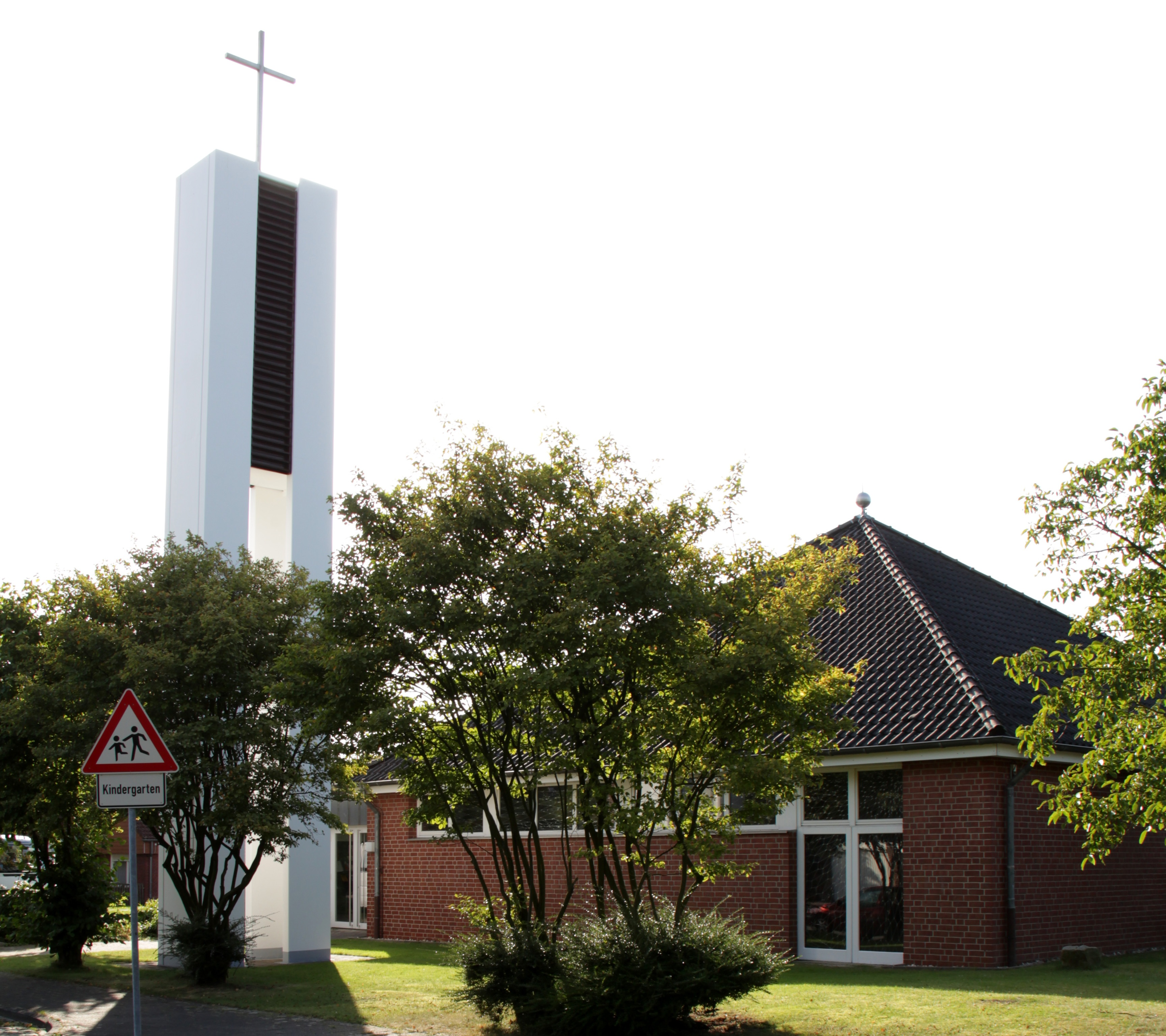 Jakobuskirche in Münster/westfalen, Stadtteil Aaseestadt